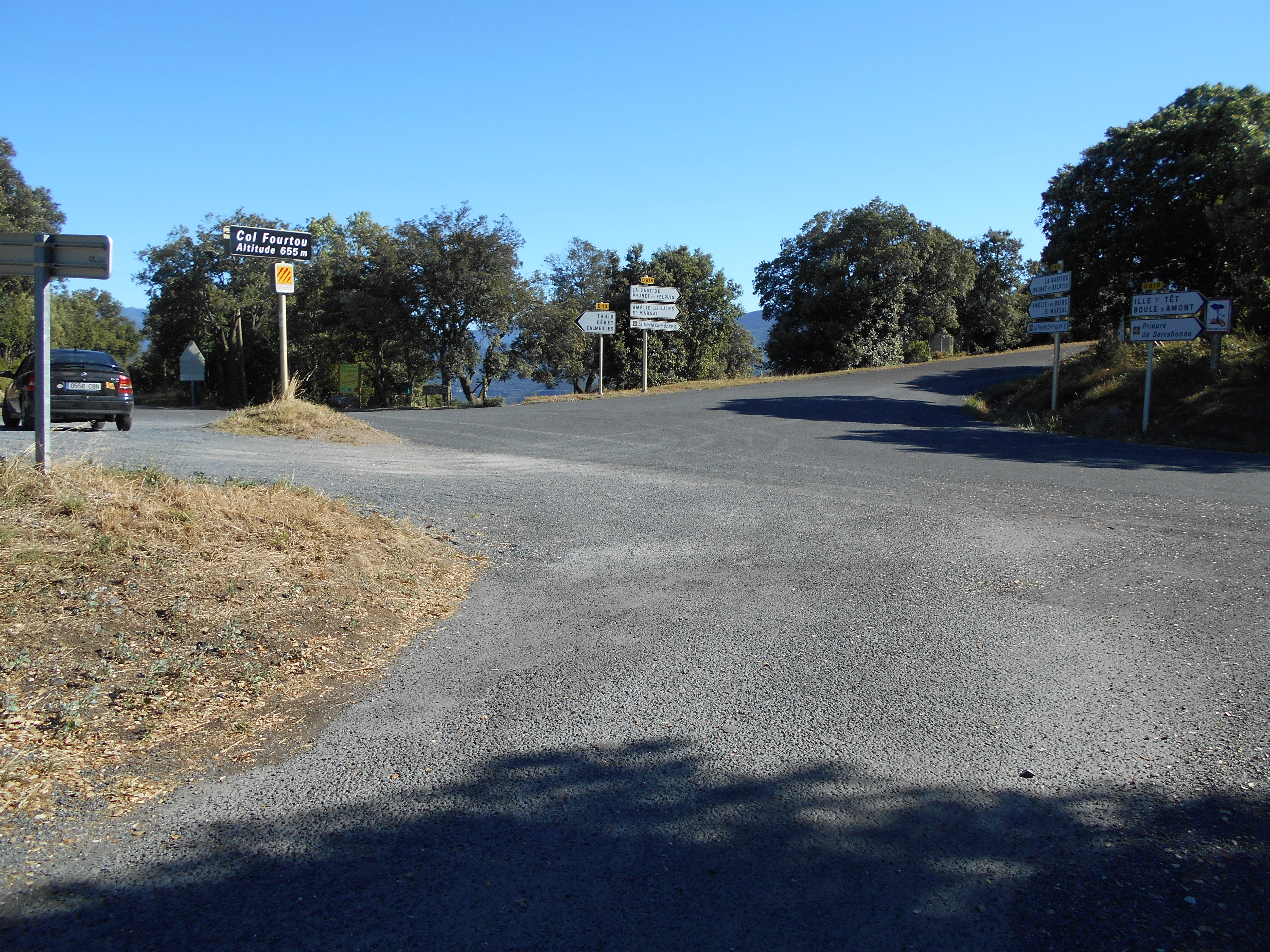 Coll d'en Fortó